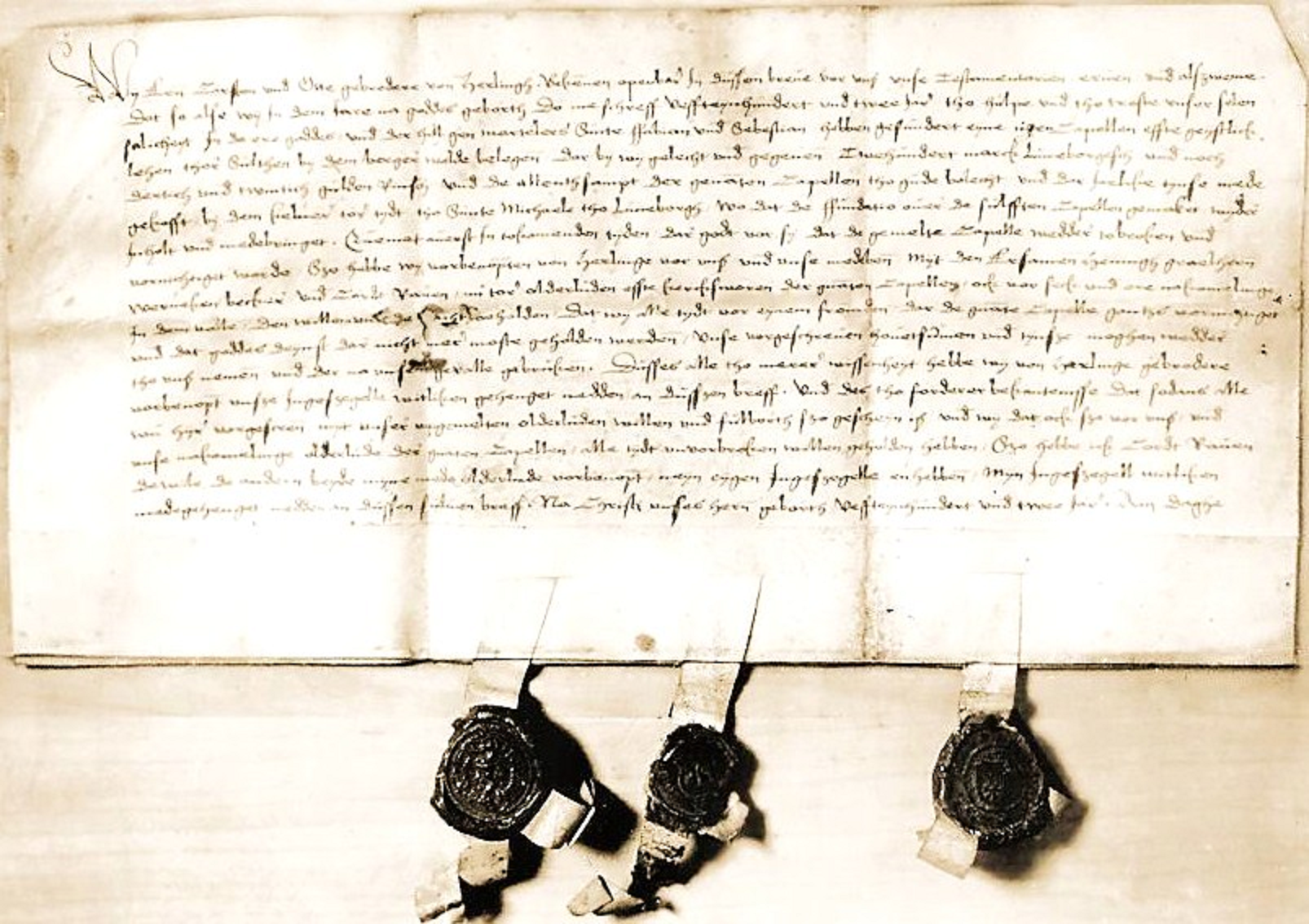 Stiftungsurkunde zu Sülze: Auf Betreiben der Herzogin Anna von Braunschweig-Lüneburg, geb. Gräfin von Nassau-Dillenburg, stifteten die Brüder Carsten und Otto von Harling, sowie die Witwe Gesche Vlothwedel, größere Summen, von deren Zinsen häufigere Messen in Sülze ermöglicht werden konnten. Anhängende Siegel: mitten: Harling (zwei auswärts gekehrte Hahnenköpfe). Diese Stiftung wurde 1504 nochmals erhöht, sodass nun ein eigener Priester angestellt werden konnte. Bischof Heinrich von Minden erkannte die Stiftung urkundlich an.